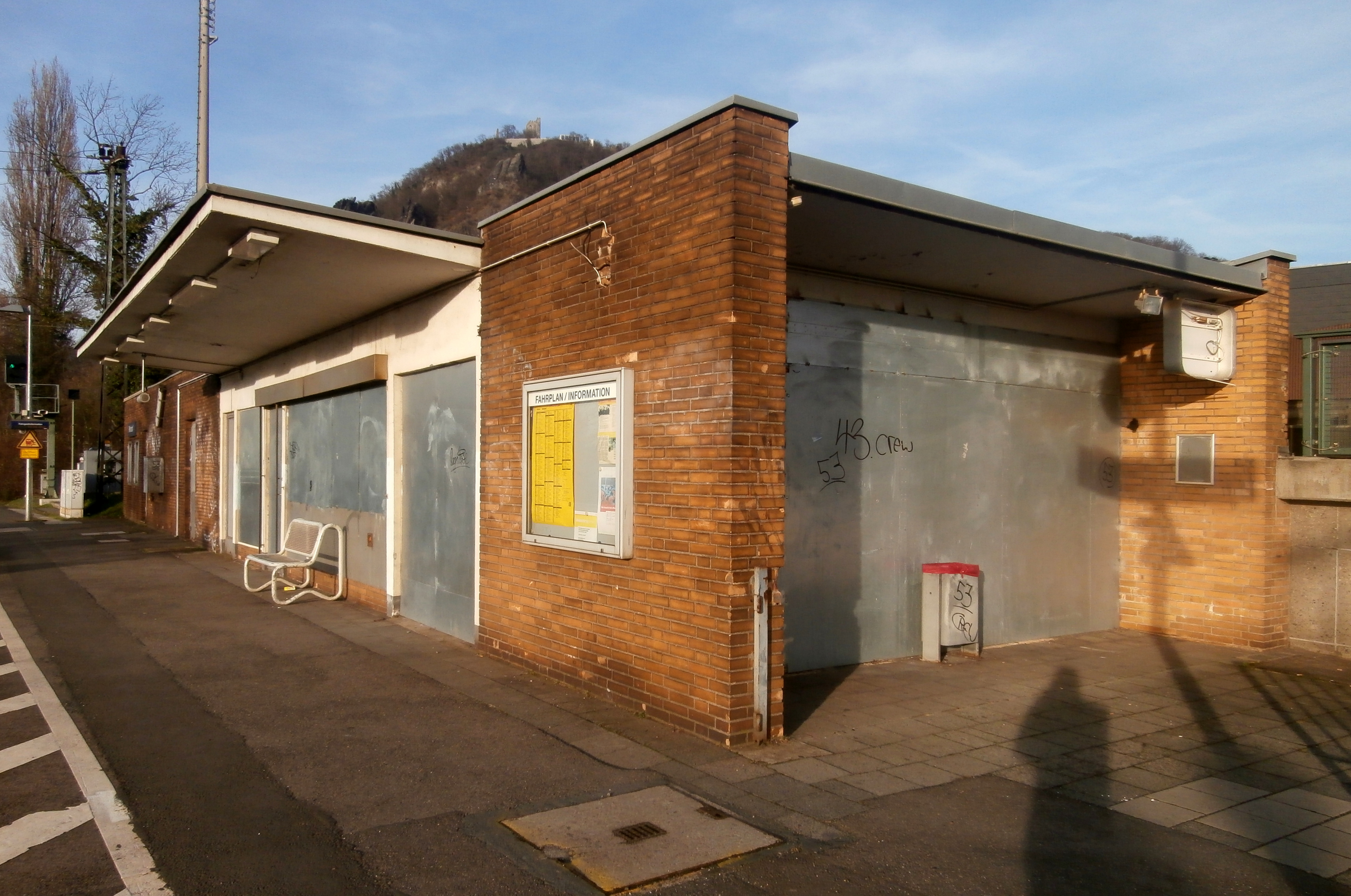 Bahnhof Rhöndorf, Rhöndorf, Bad Honnef